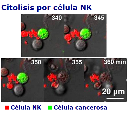 Figura 1.C_ Citolisis por célula NK. Destrucción de células cancerosas aisladas, mostradas en el transcurso del tiempo. Células NK (en rojo). La secuencia de lisis de las células MCF7 de cáncer de mama (en verde), mostrada a medida que pierde su señal de proteína verde fluorescente a los 355 minutos. Célula MCF7 muerta (en negro).